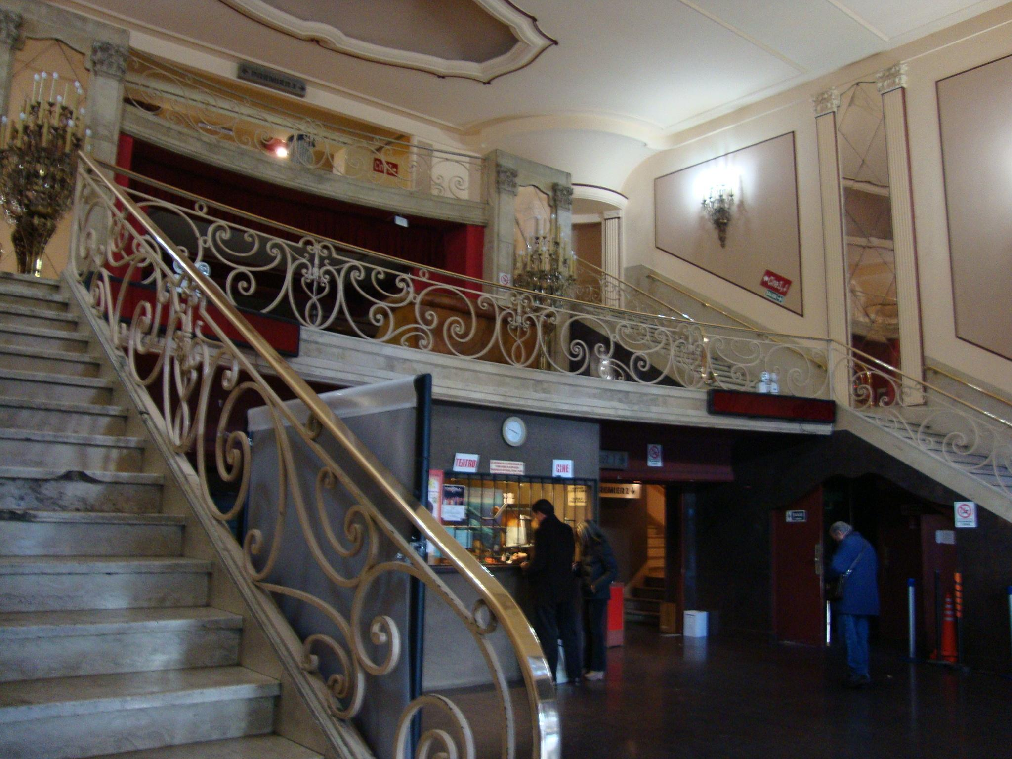 Foyer del Teatro Premier, en Avenida Corrientes 1565. Buenos Aires, Argentina.